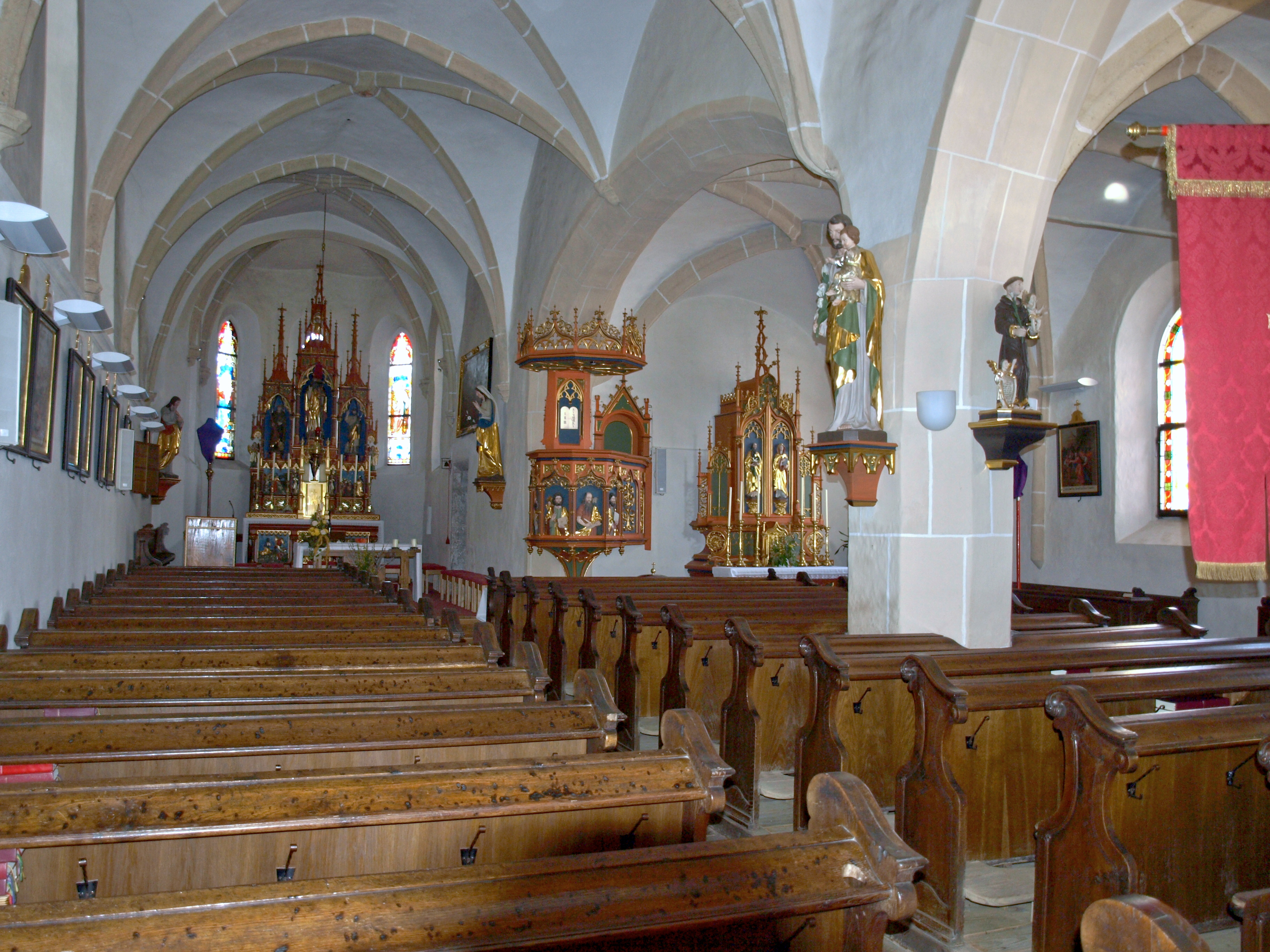 Kath. Pfarrkirche hl. Nikolaus